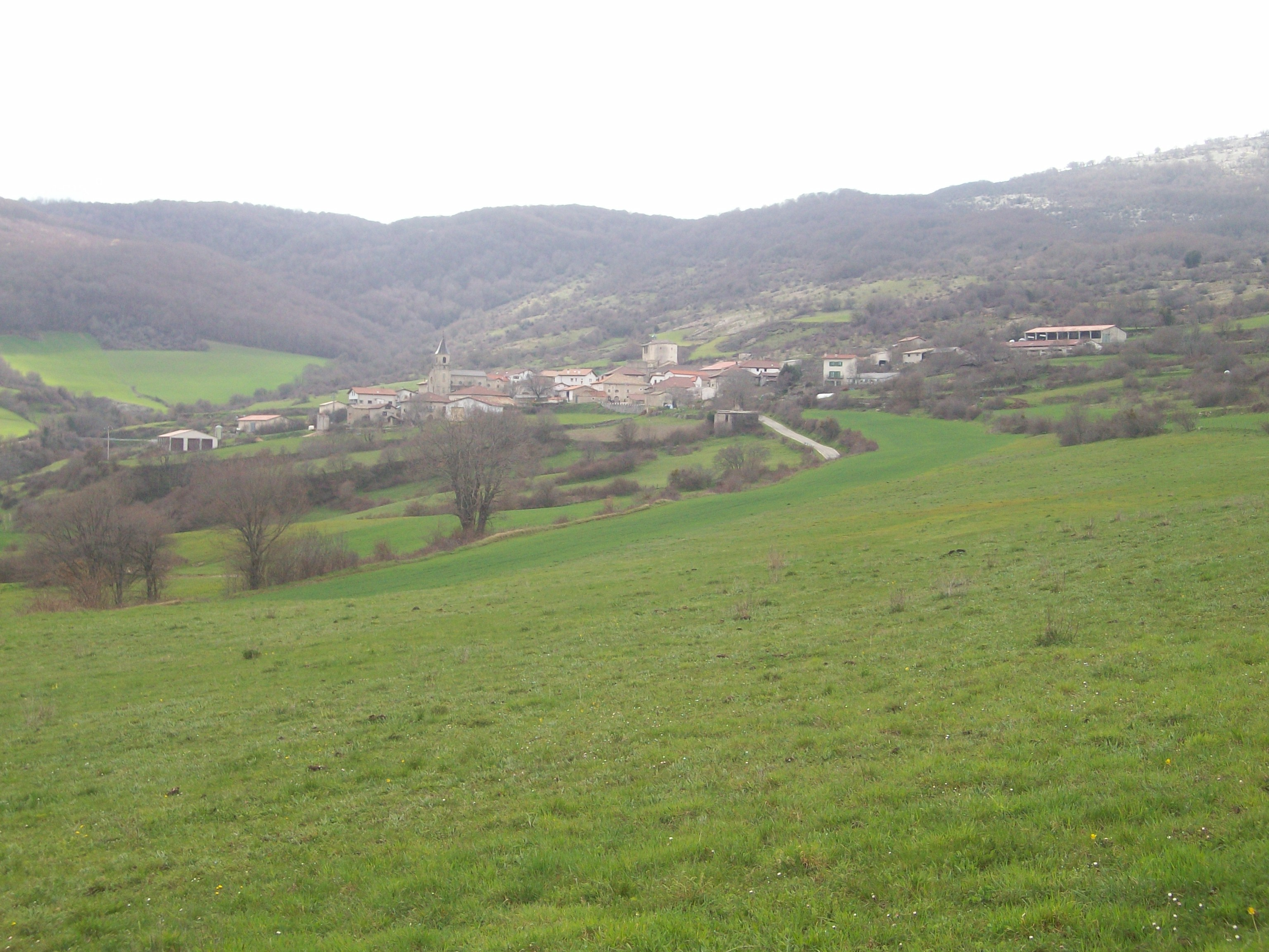 Goñi herria. Goñerri. Nafarroa, Euskal Herria. Goñi village. Valley of Goñi. Navarre, Basque Country.